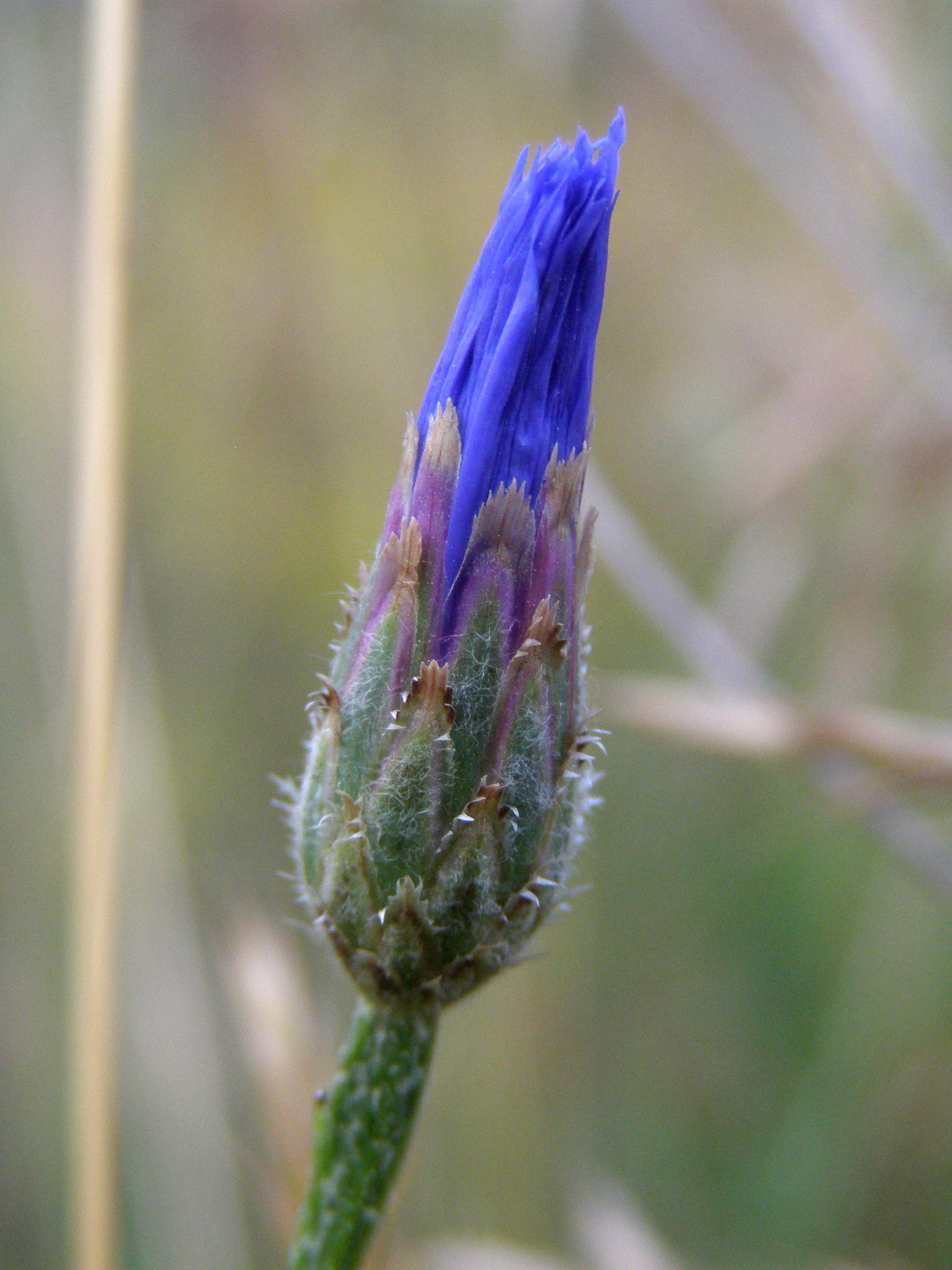 Centaurea cyanus